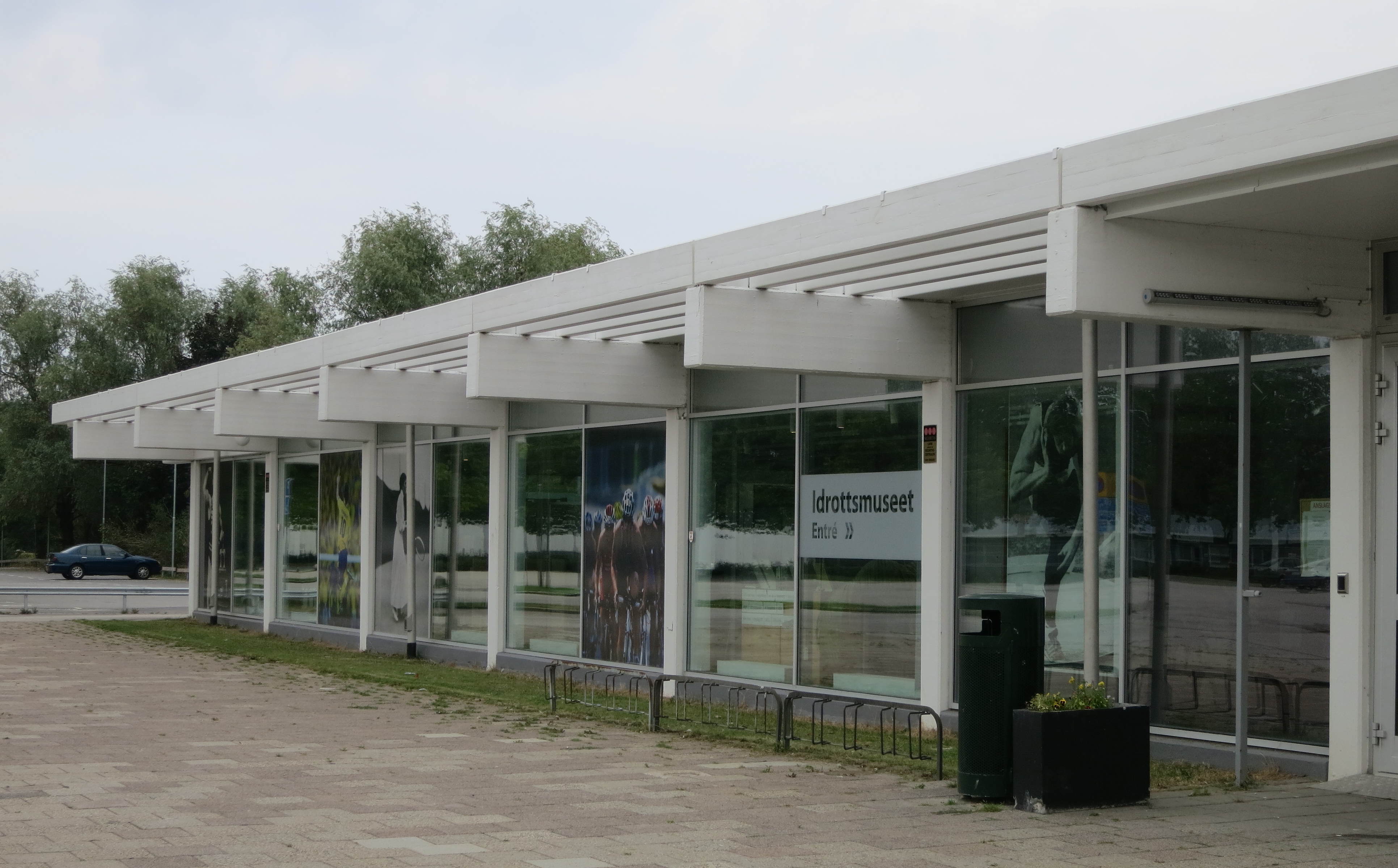 Idrottsmuseet i Baltiska hallens foaje i Malmö